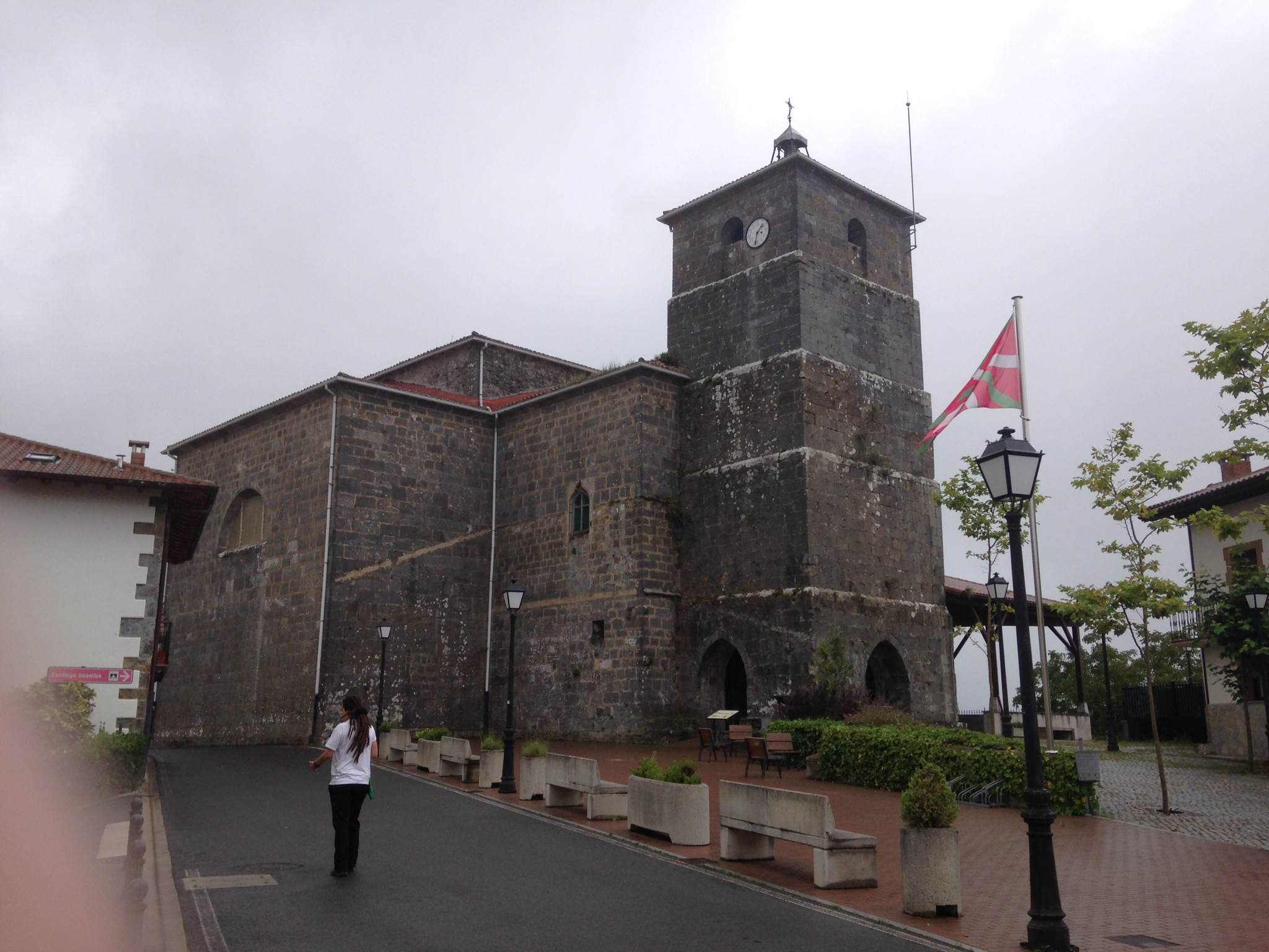 Nabarniz, iglesia de Santa María de Gorritiz. Bizkaia, País Vasco (España)